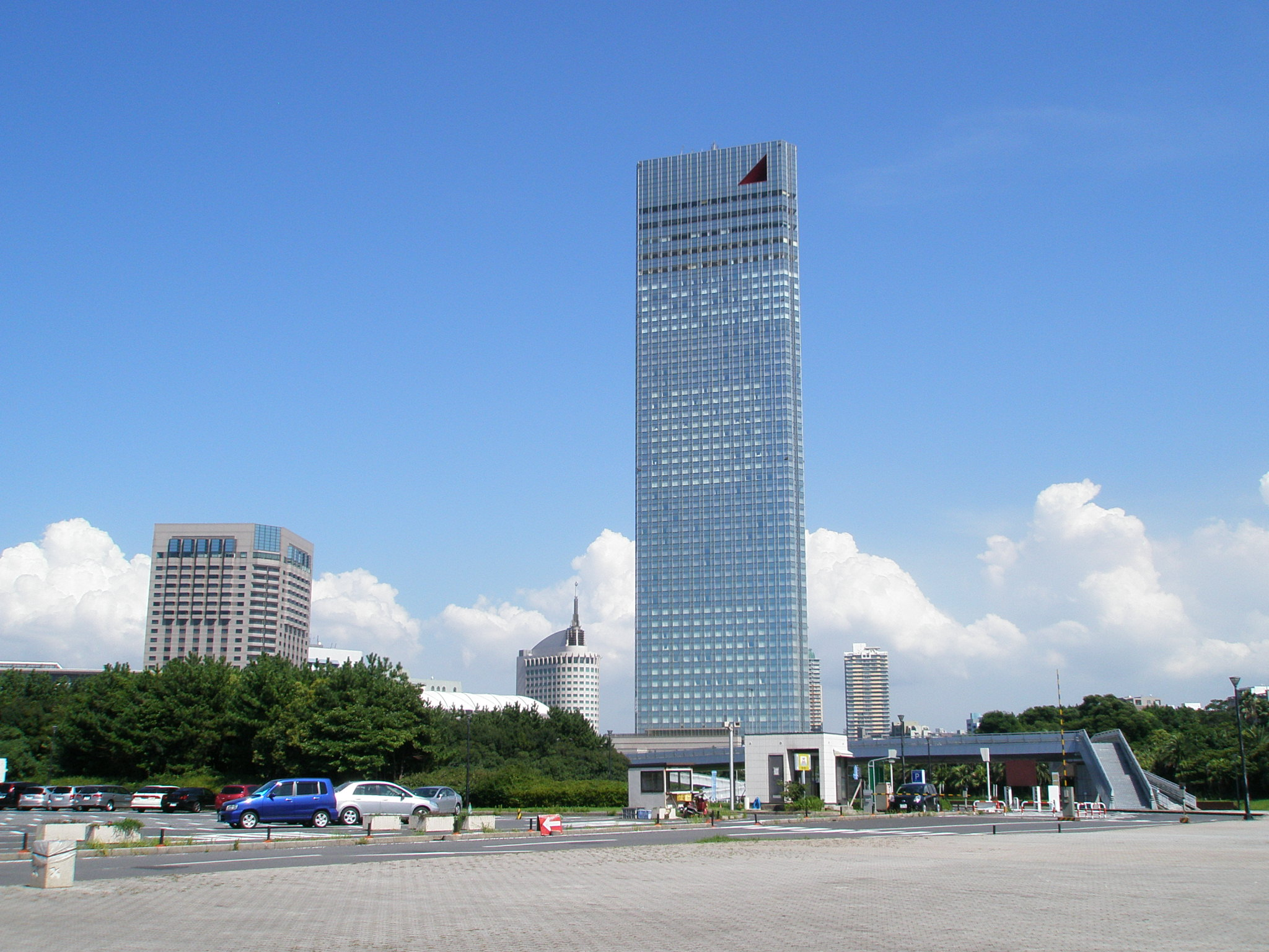 APAホテル&リゾート東京ベイ幕張、千葉マリンスタジアムから